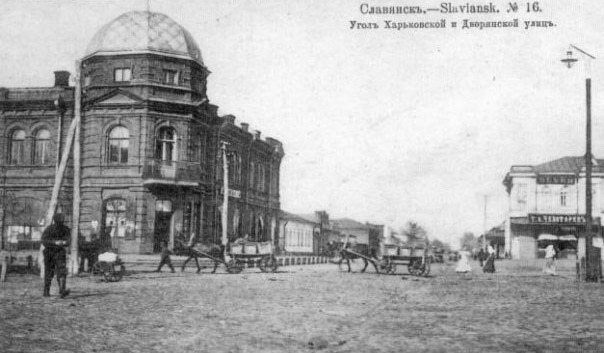 Славянск на дореволюционной открытке